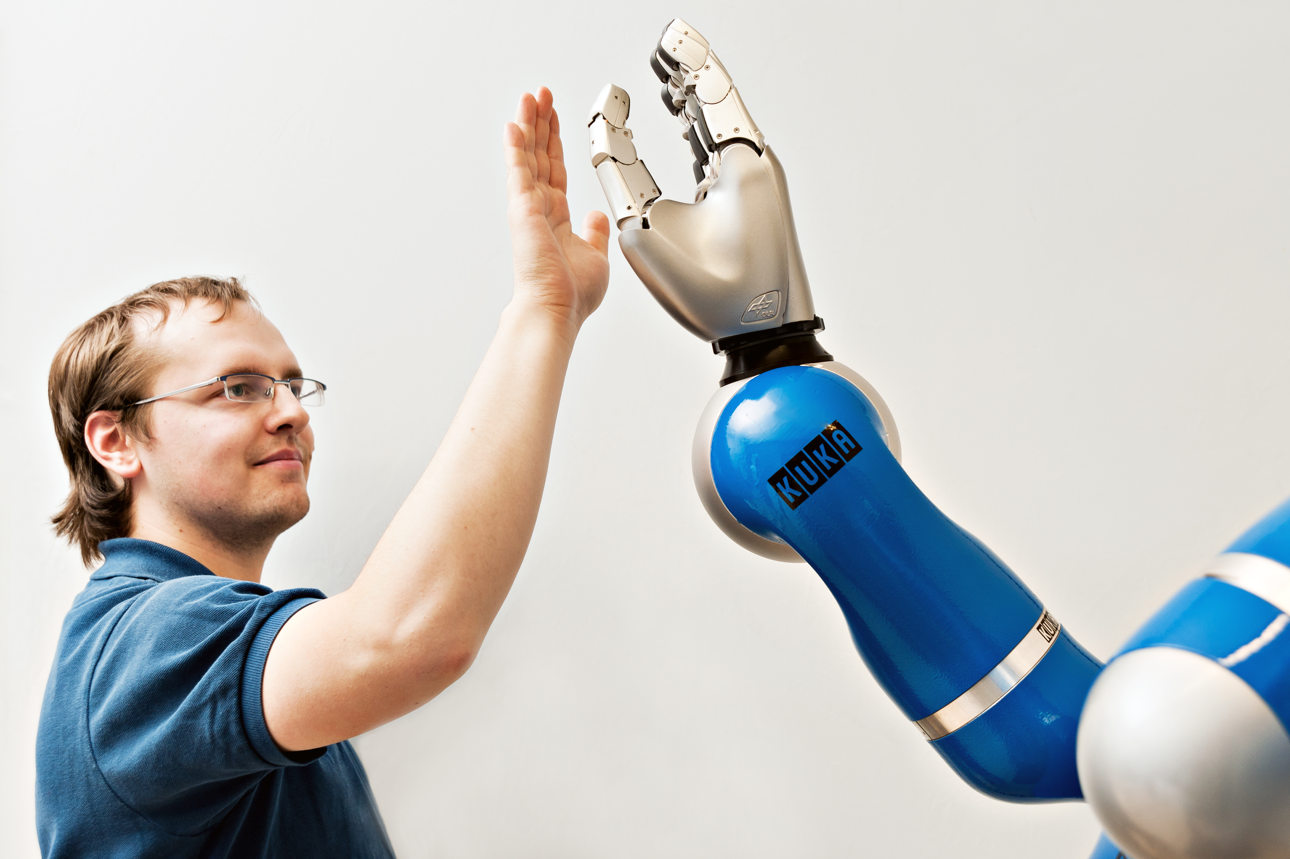 Stipendienprogramm